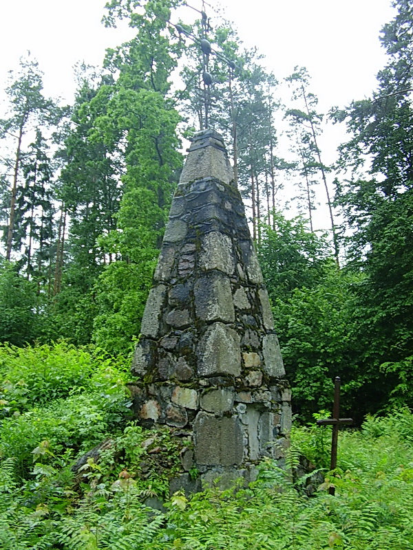 Ясянец. Склеп-пахавальня Яленскіх